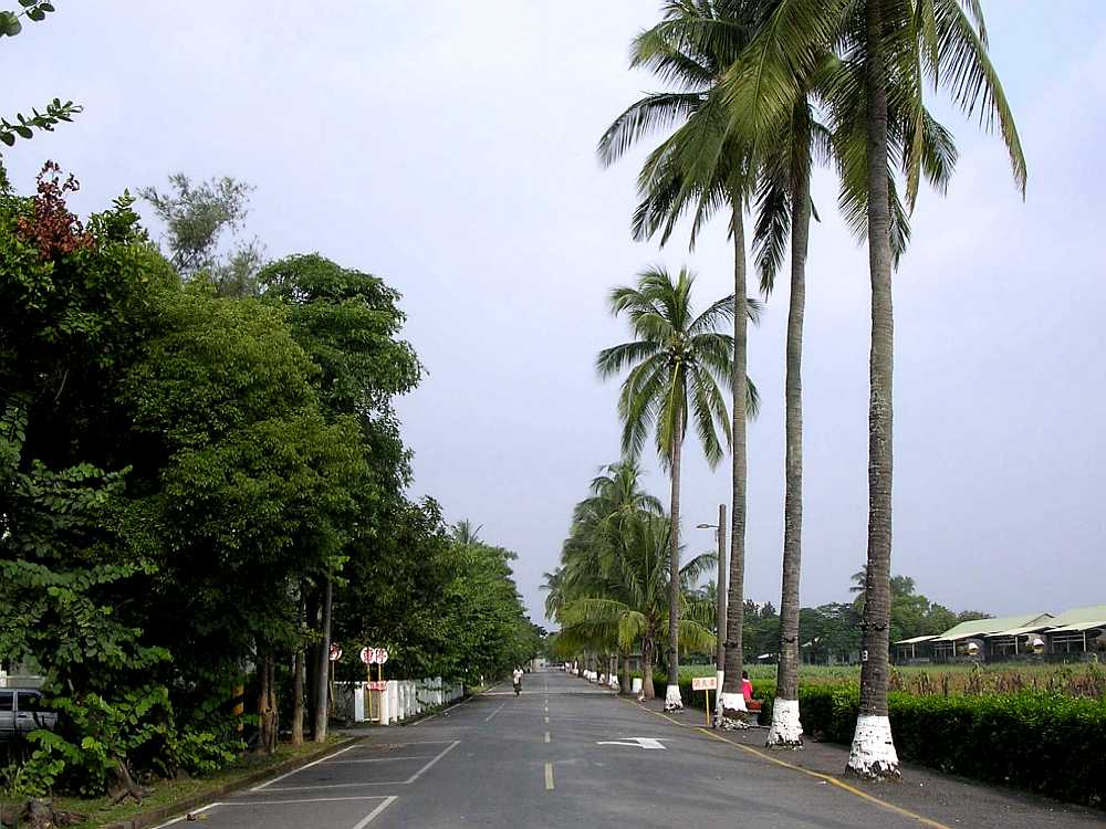 中文（台灣）: 屏東南州糖廠。